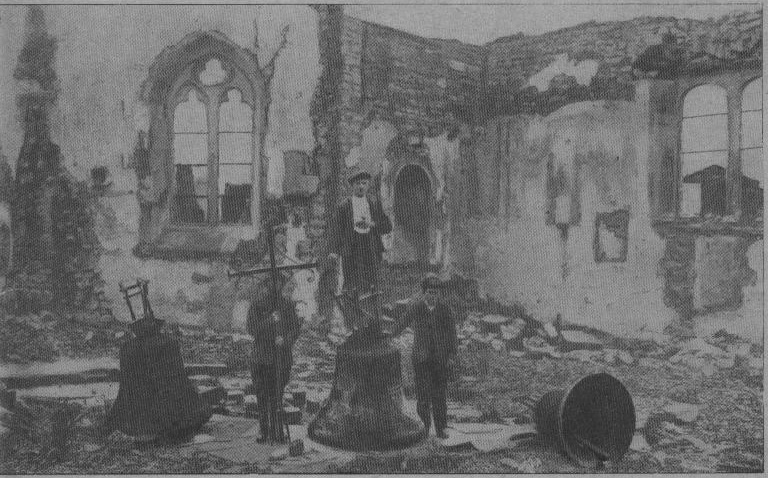 les destructions de l'église d'Auzécourt, présentation de_3_cloches_et_d'une croix par les français qui reprirent le village.